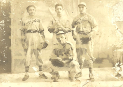 Cesar Suarez Picher Estrella